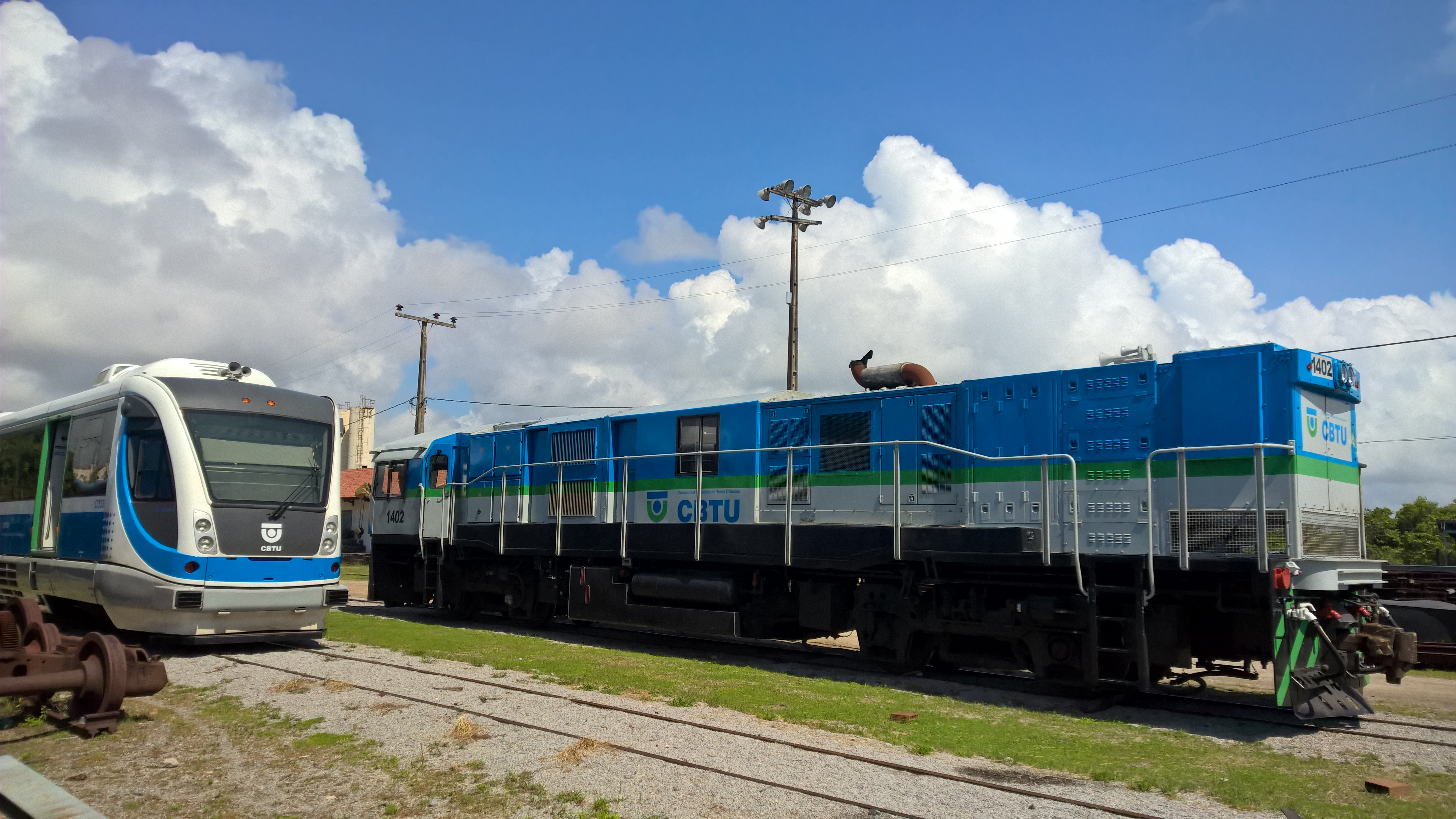 Locomotiva Progress Rail junto ao VLT nas linhas da oficina.